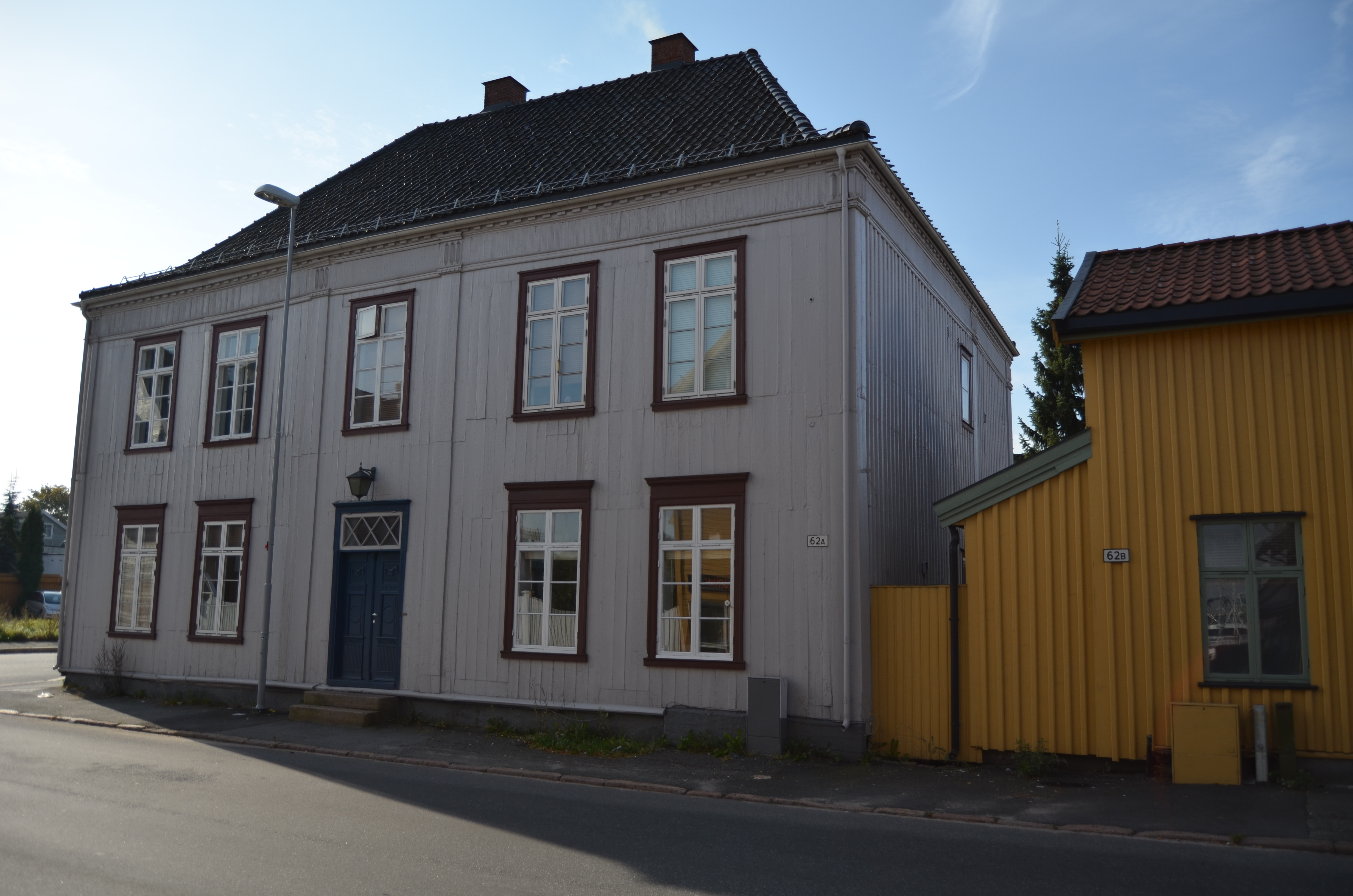 Bangegården i Drammen ble etablert som handelsgård rundt 1790, men husene på eiendommen er fra slutten av 1600-tallet. Adresse Tollbugata 62.